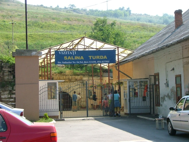 Intrarea veche in salină prin galeria Franz-Josef (str. Salinelor nr.54)